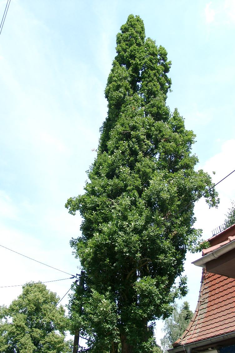 Quercus robur 'Fastigiata' (eine Säuleneiche oder Pyramideneiche)